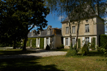 Vue générale de la façade